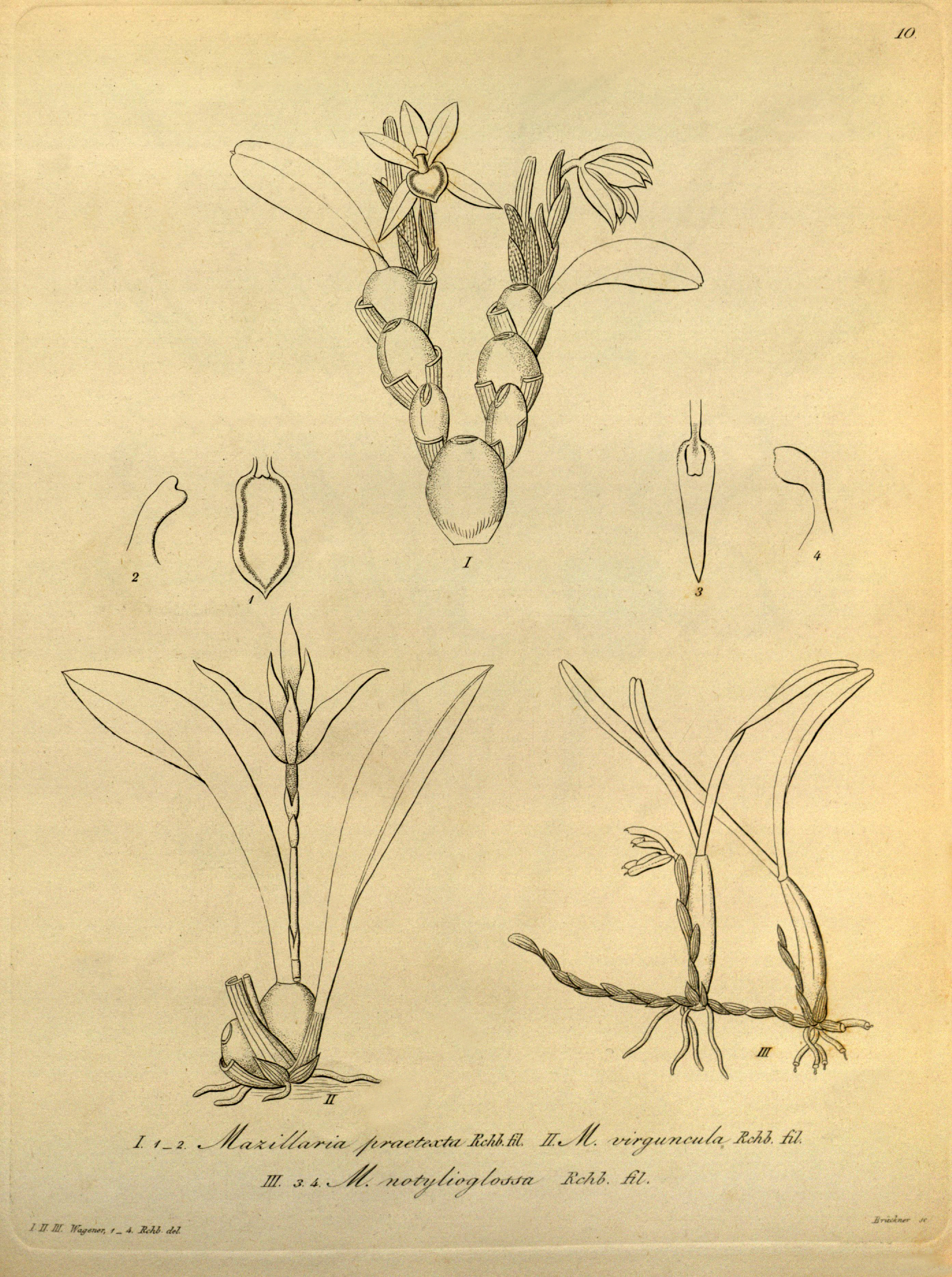 Illustration of: I. Maxillaria praetexta II. Maxillaria virguncula III. Maxillaria notylioglossa